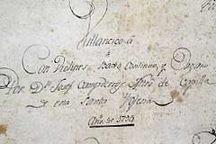 José de Campderrós, Josep de Campderrós